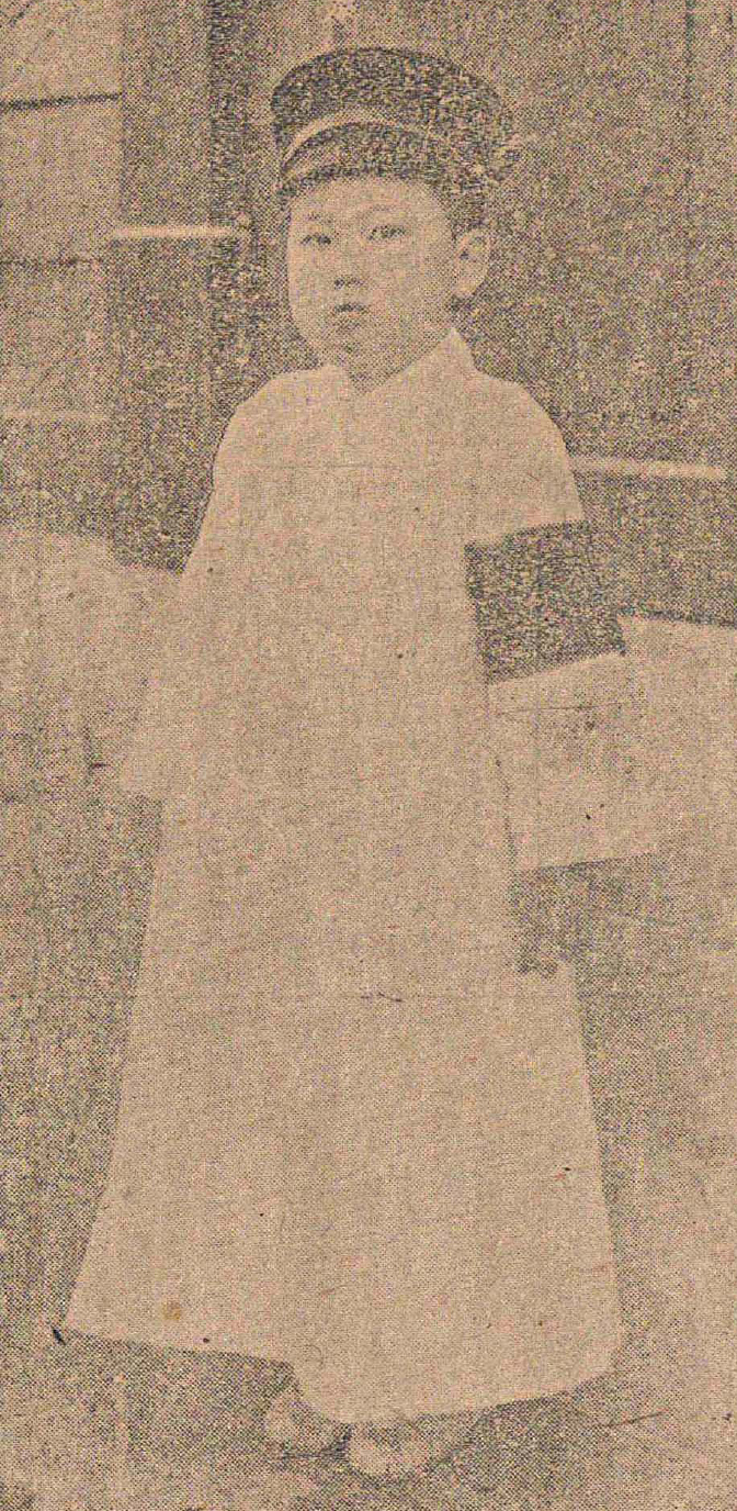 양부 이준용의 장례식에서 이우 (1917년)